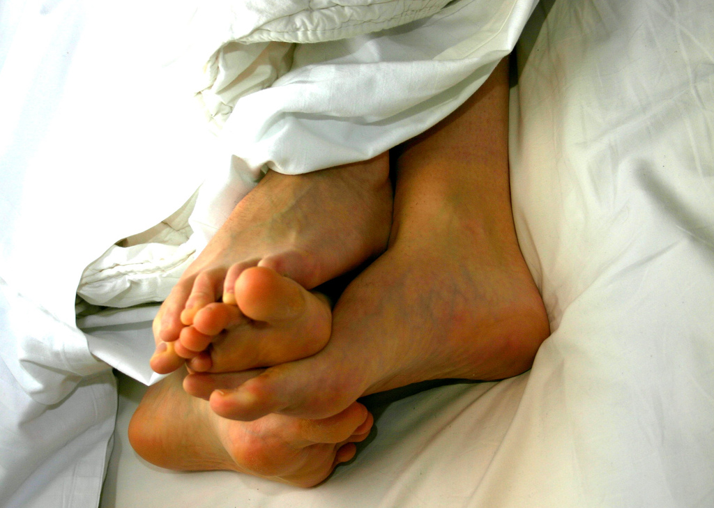 Lesbische Zweisamkeit im Bett